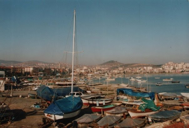 Pendik (Istanbul), Sahil 1981